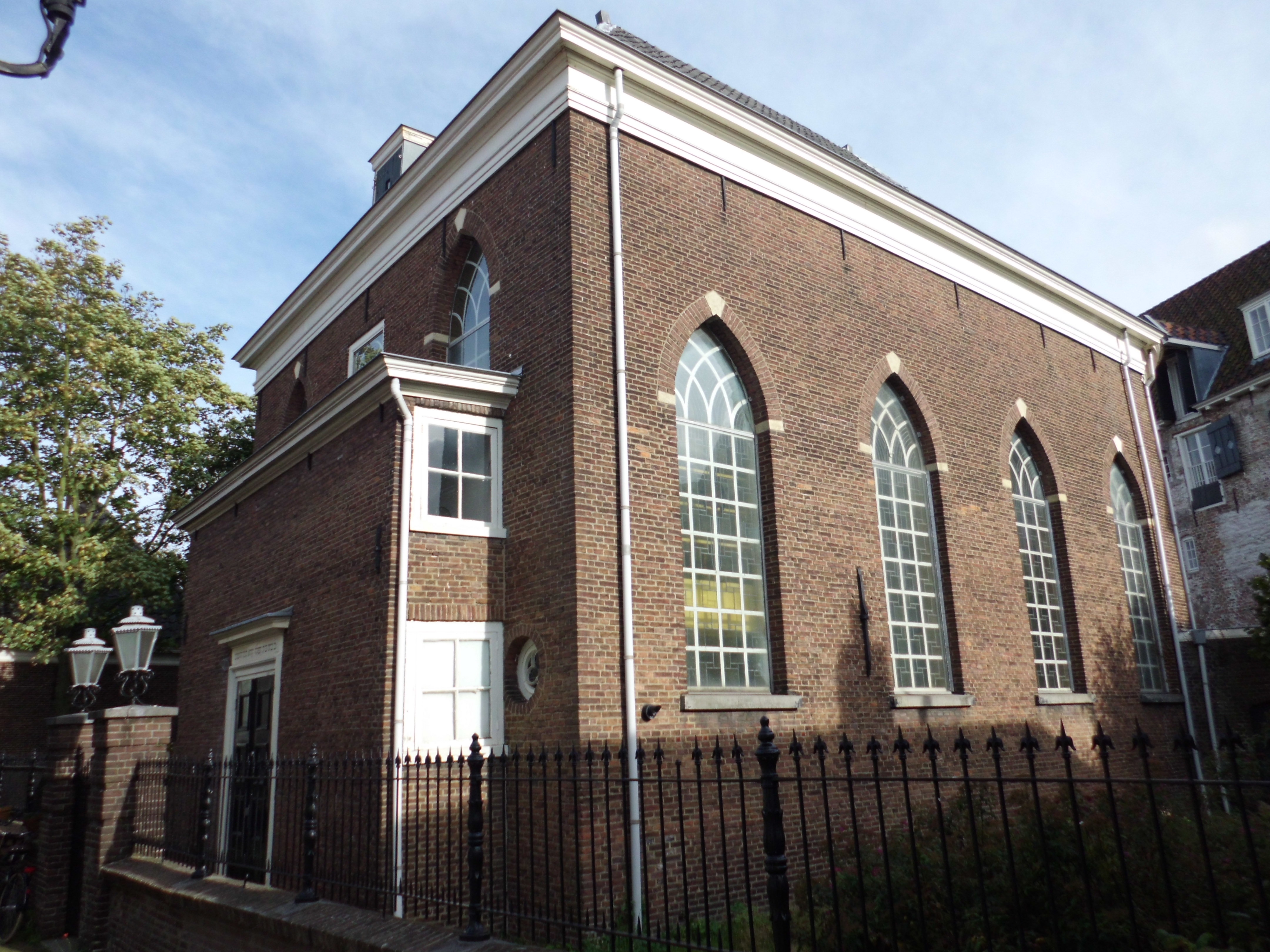 Synagoge Amersfoort